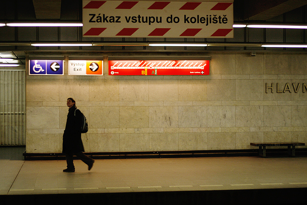 Cestující ve stanici metra Hlavní nádraží.